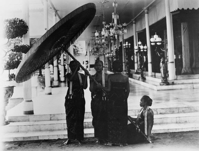 Foto. Hofdames met de pajong van de Susuhunan van Solo, Soerakarta